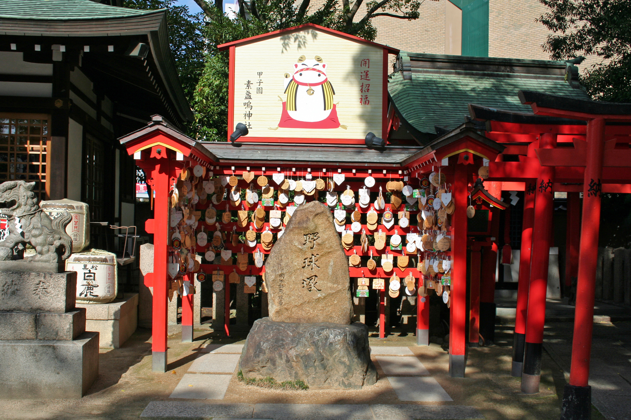 素盞嗚神社。阪神甲子園球場の南西部にある神社。 岡田彰布が建立した野球塚。